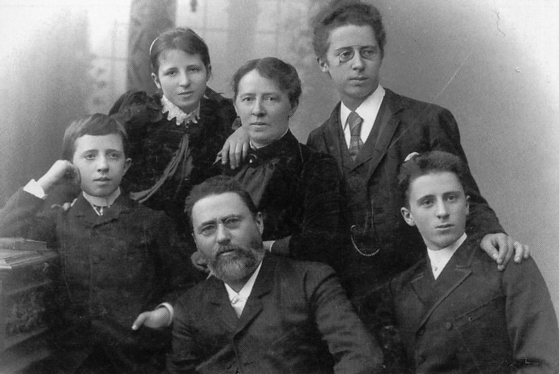 Familie des Unternehmers Peter Adolph Rudolph Ibach, ca. 1890; v. l.: Hans, Elsa, P. A. Rudolph, Hulda, Max, Albert Rudolf Ibach